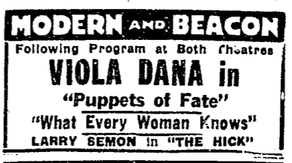 Advertisement, Boston, Massachusetts, USA